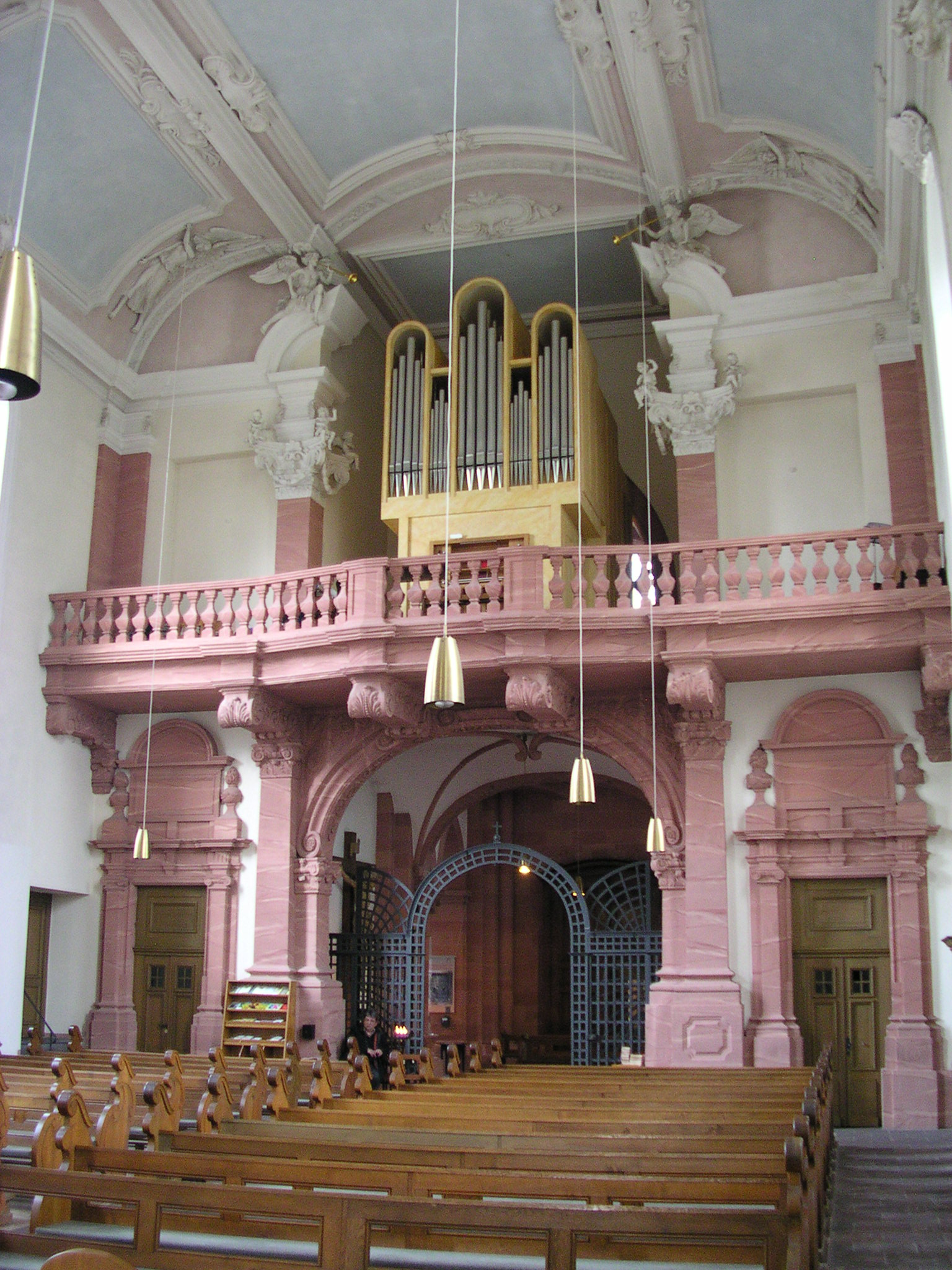 Worms, Blick zum Altar der Pauluskirche